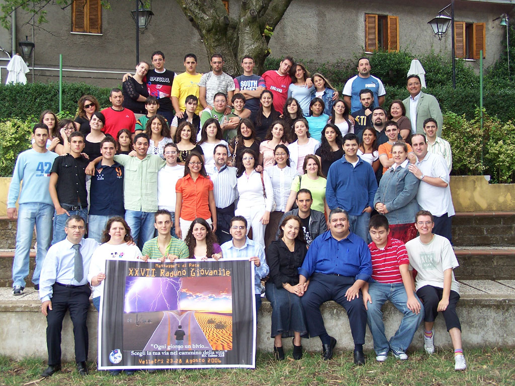 Foto di gruppo del raduno giovanile dei Messaggeri di Pace, 2006